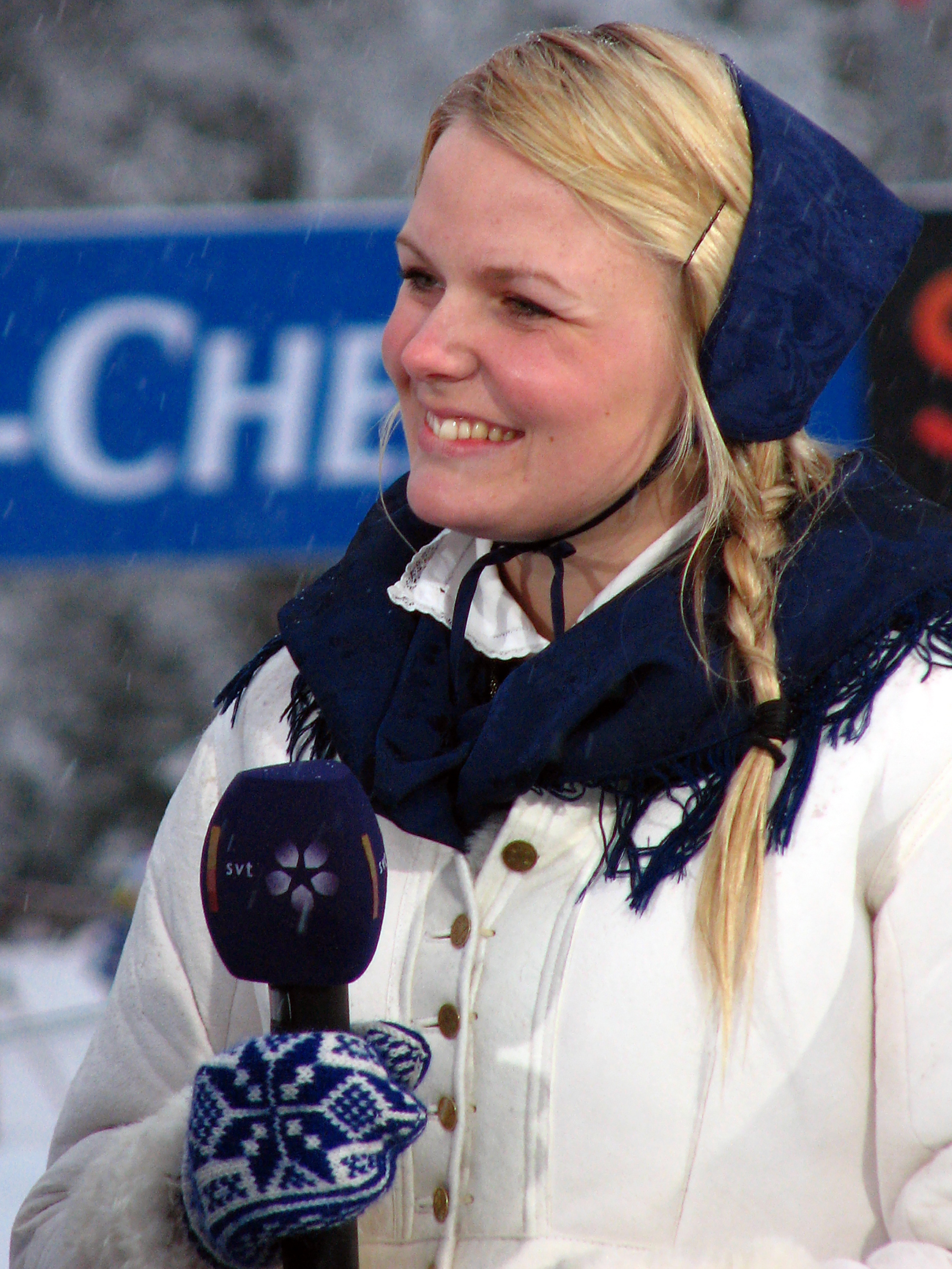 Kranskullan, Vasaloppet 2008, Carolina Westling intervjuas av SVT vid vasaloppsstarten. Sälen, Sverige. Redigeringar av ursprunglig uppladdning: nivåer, beskärning, skärpa.